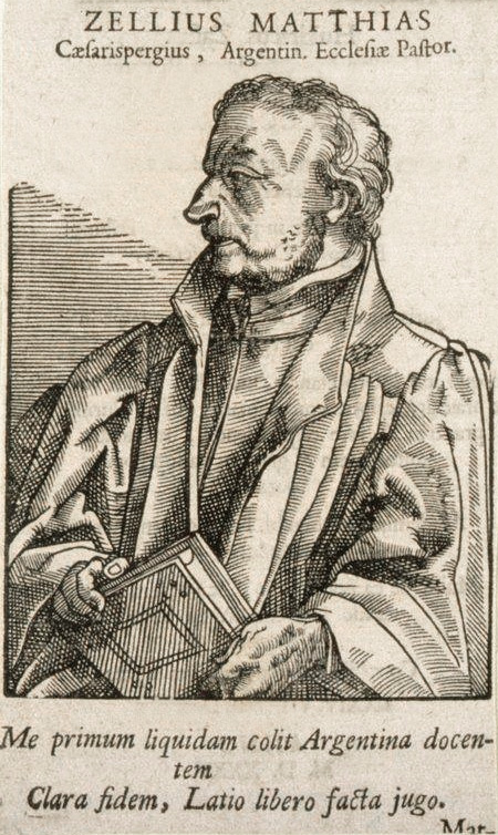 Zellius Matthias Caesarispergius, Argentin, Ecclesiae Pastor. 1540. Bibliothèque nationale et universitaire de Strasbourg